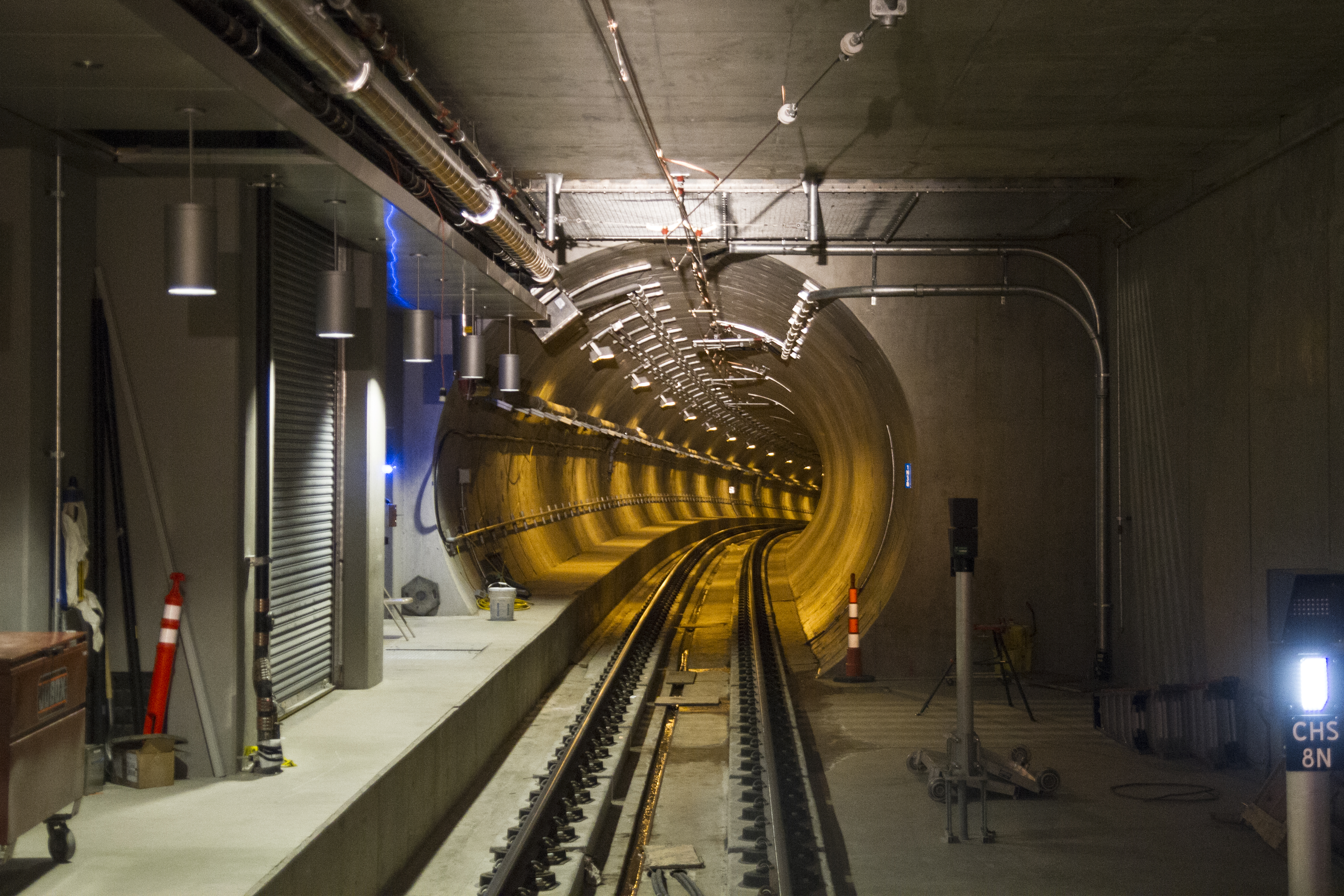 Capitol Hill Station Media Tour 05-26-15 04